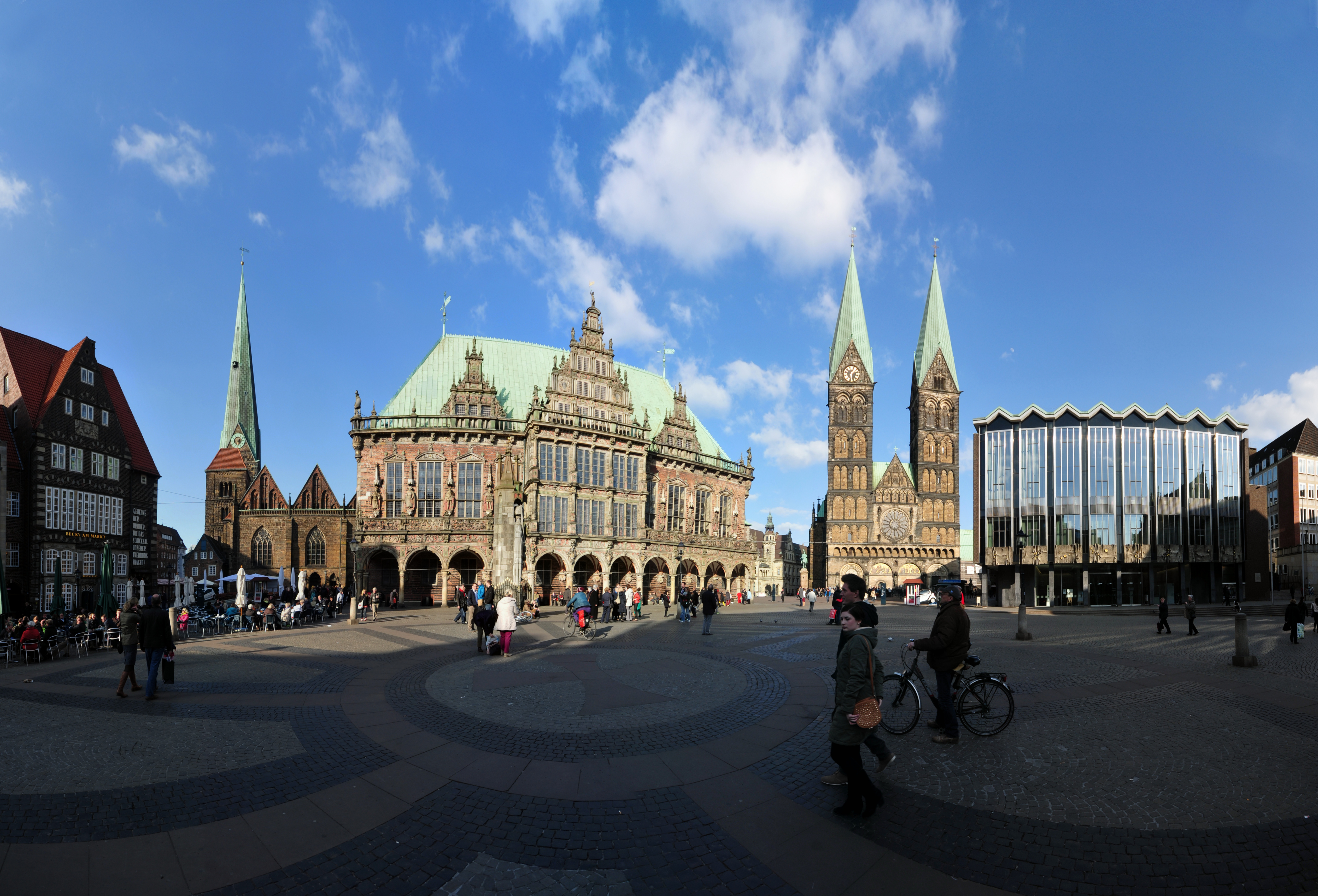 Bremen